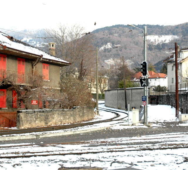 De voormalige spoorlijn van de Chemin de fer Aigle-Ollon-Monthey-Champéry (AOMC) bij het station in Aigle. Opname door Evangelische Omroep gebruikt bij publikatie van Rail Away afleveringen: *[1] *[2]